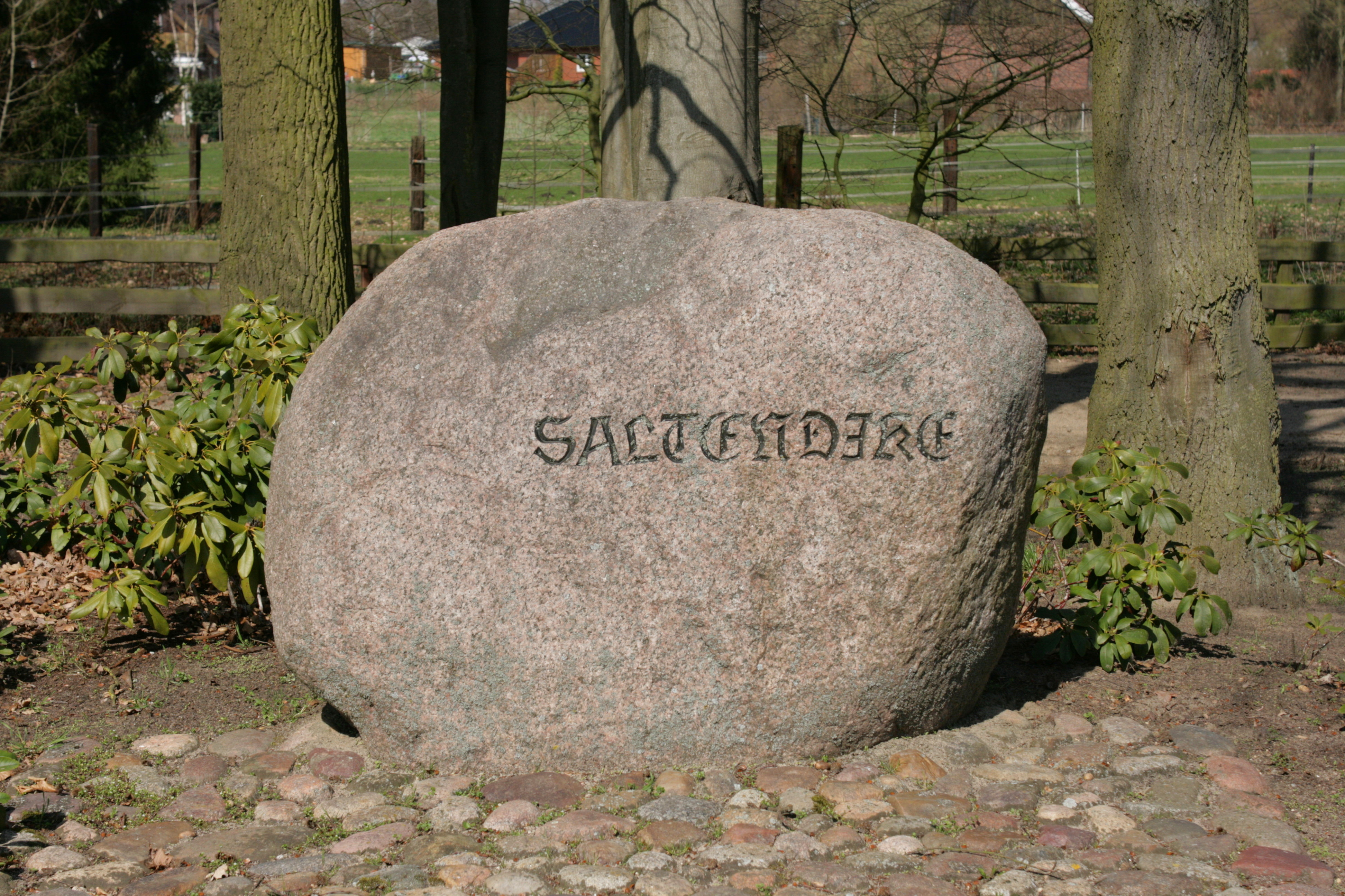 Hauptstraße in Soltendieck